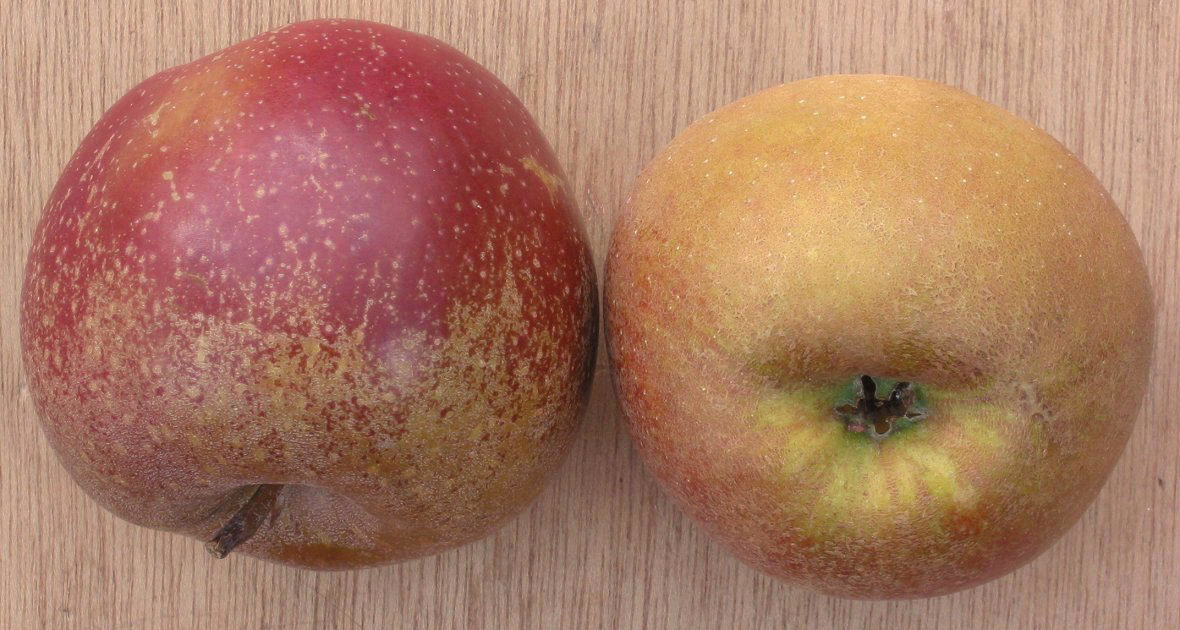 Malus; variety Goudreinet (Schone van Boskoop)